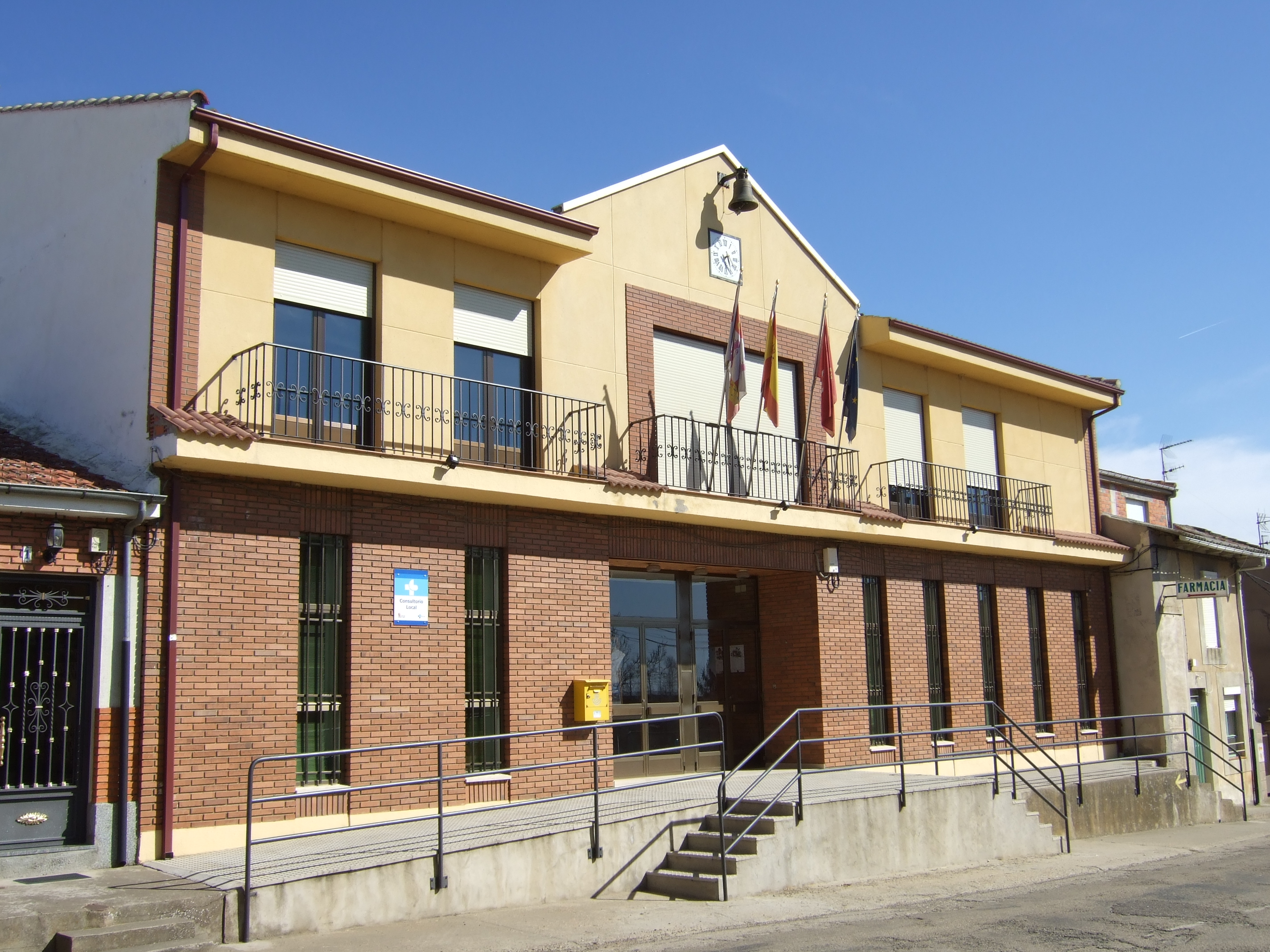 Fachada del ayuntamiento de Palacios de la Valduerna.